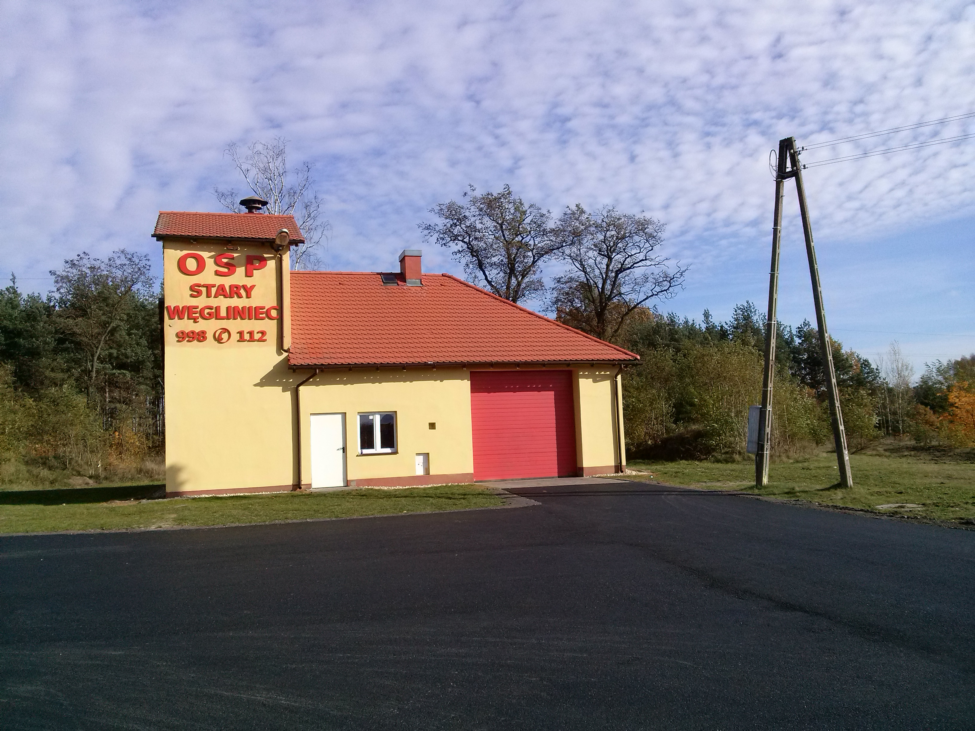 Stary Węgliniec - remiza Ochotniczej Straży Pożarnej (po remoncie), jesień 2016